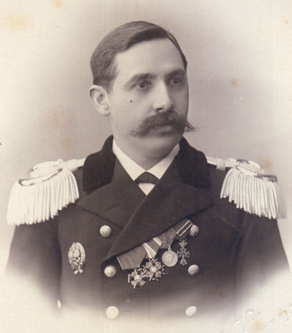 Чучугин, Дмитрий Георгиевич (на български: Димитър Георгиев Чучулев ) (1869—1941) — българин, инженер-механик.